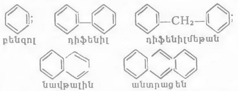 Բենզոլ, դիֆենիլ, դիֆենիլմեթան, նավթալին, անտրացեն